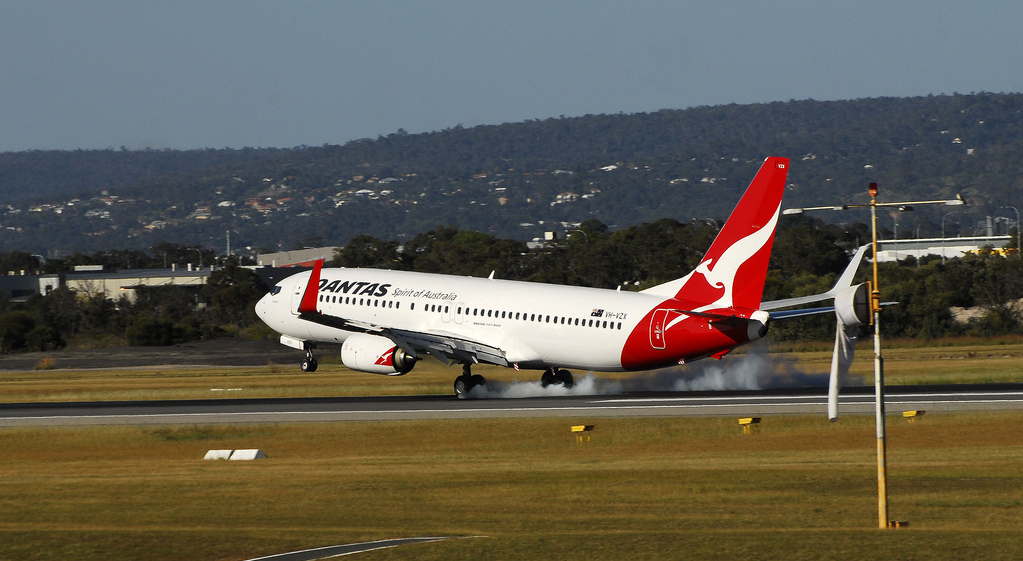 Qantas 737-800 landing runway 03